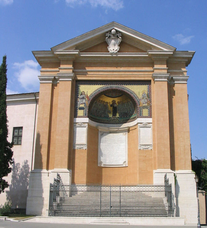 Das Bild zeigt das Mosaik des so genannten Leonischen Tricliniums. In der Rundung, also der Apsis ist Jesus zu erkennen, wie er seinen Aposteln den Auftrag erteilt, die Menschen auf den rechten Weg zu führen. Die beiden kleineren Mosaike an der Stirnseite zeigen links Jesu, wie er Konstantin und Petrus die Machtinsignien überreicht. Das rechte Mosaik zeigt wiederum Petrus, der die Machtinsignien an Papst Leo und Kaiser Karl d. Gr. weiterreicht.